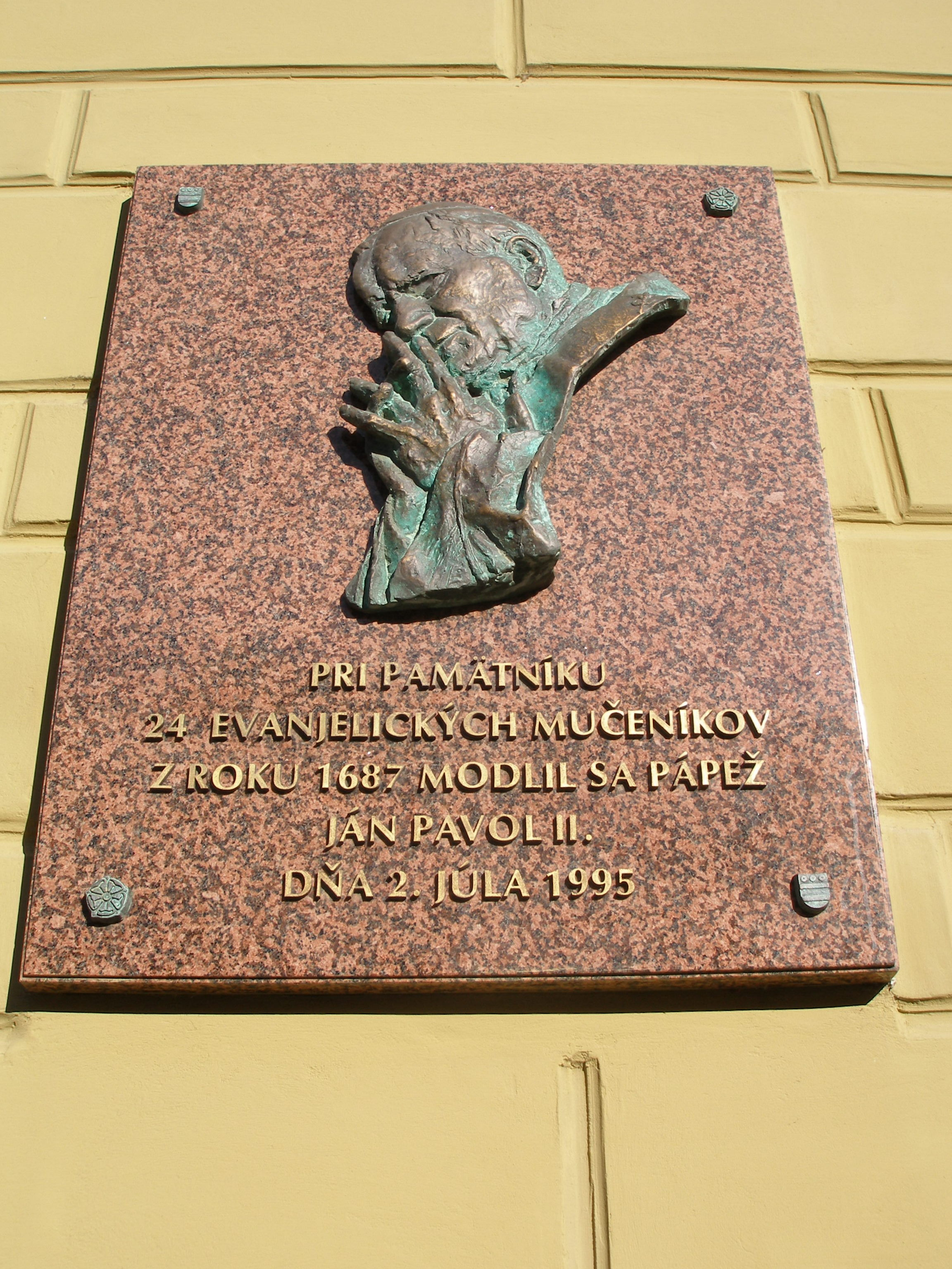 Pamätná doska na budove Kolégia.. Pápež Ján Pavol II, ulica Hlavná mesto Prešov.